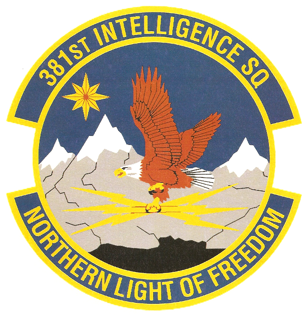 381st Intelligence Squadron emblem